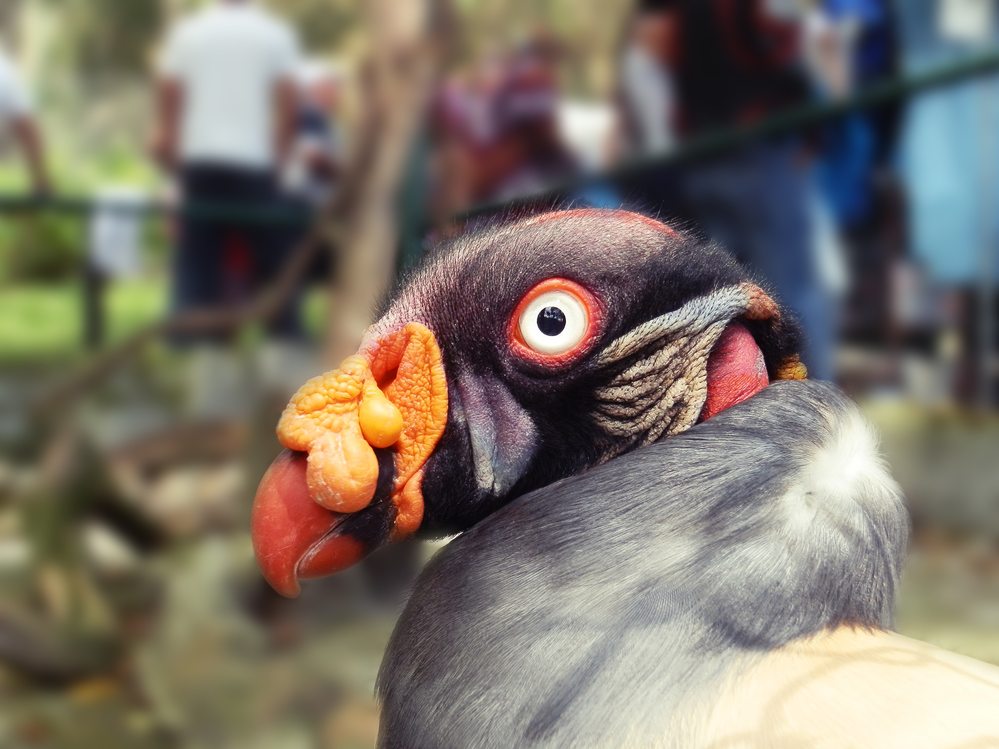 Un ejemplar de Sarcoramphus papa en el Parque Zoológico Chorros de Milla.